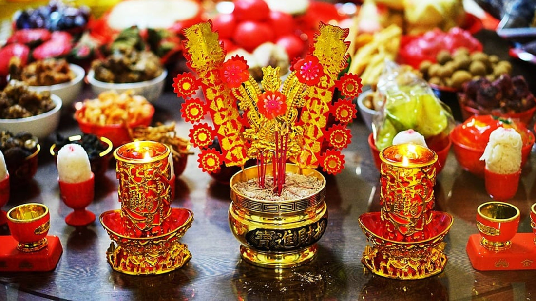 中文（台灣）: 祭祀天界神明